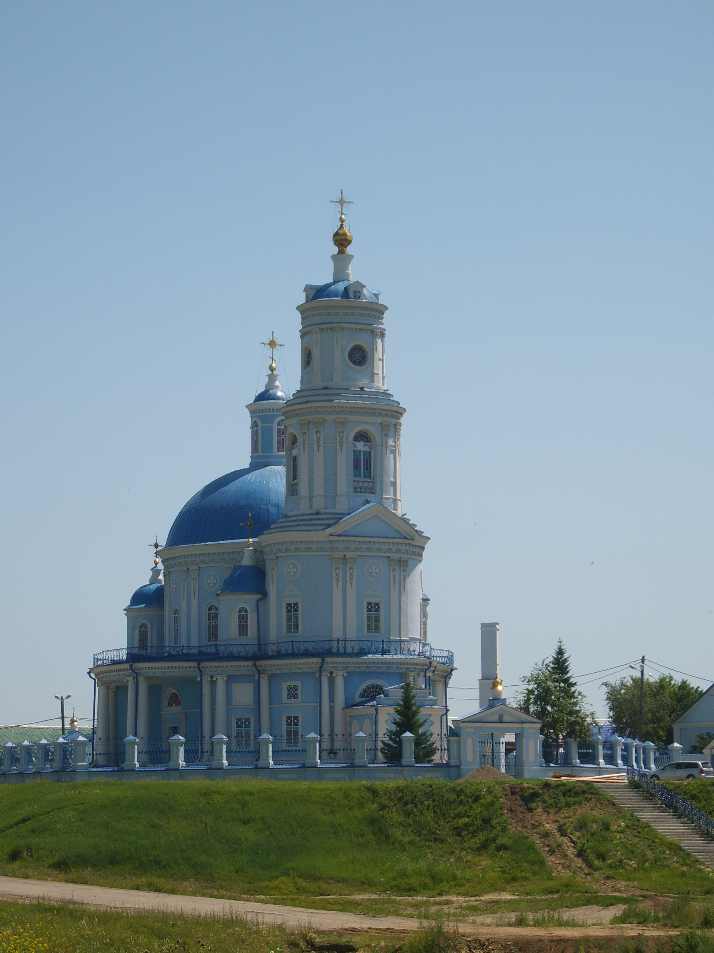 Храм Казанской иконы Божией Матери